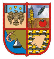 Escudo del municipio sonorense.